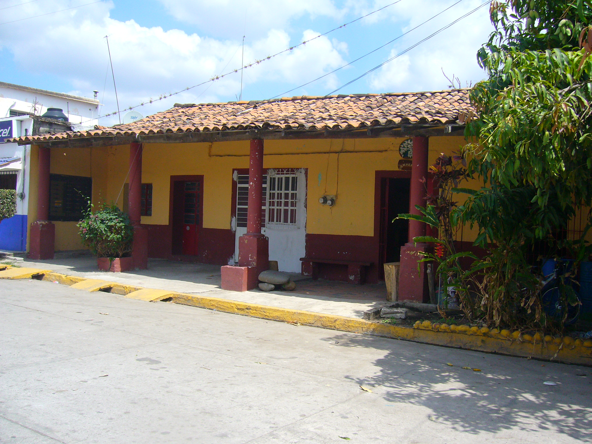 Ex-Hacienda de la Trinidad de la Ciudad de Camarón de Tejeda